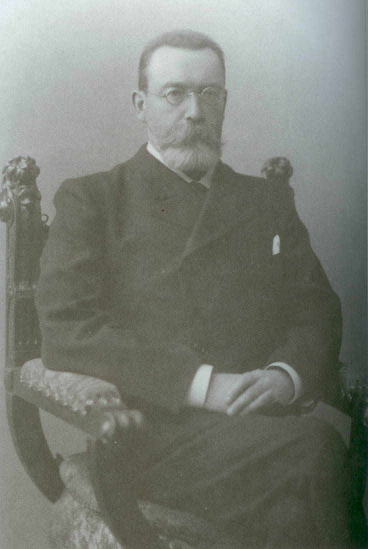 Шипов, Дмитрий Николаевич(14 мая 1851 — 14 января 1920) — русский политический деятель, один из лидеров земского движения конца XIX — начала XX веков.